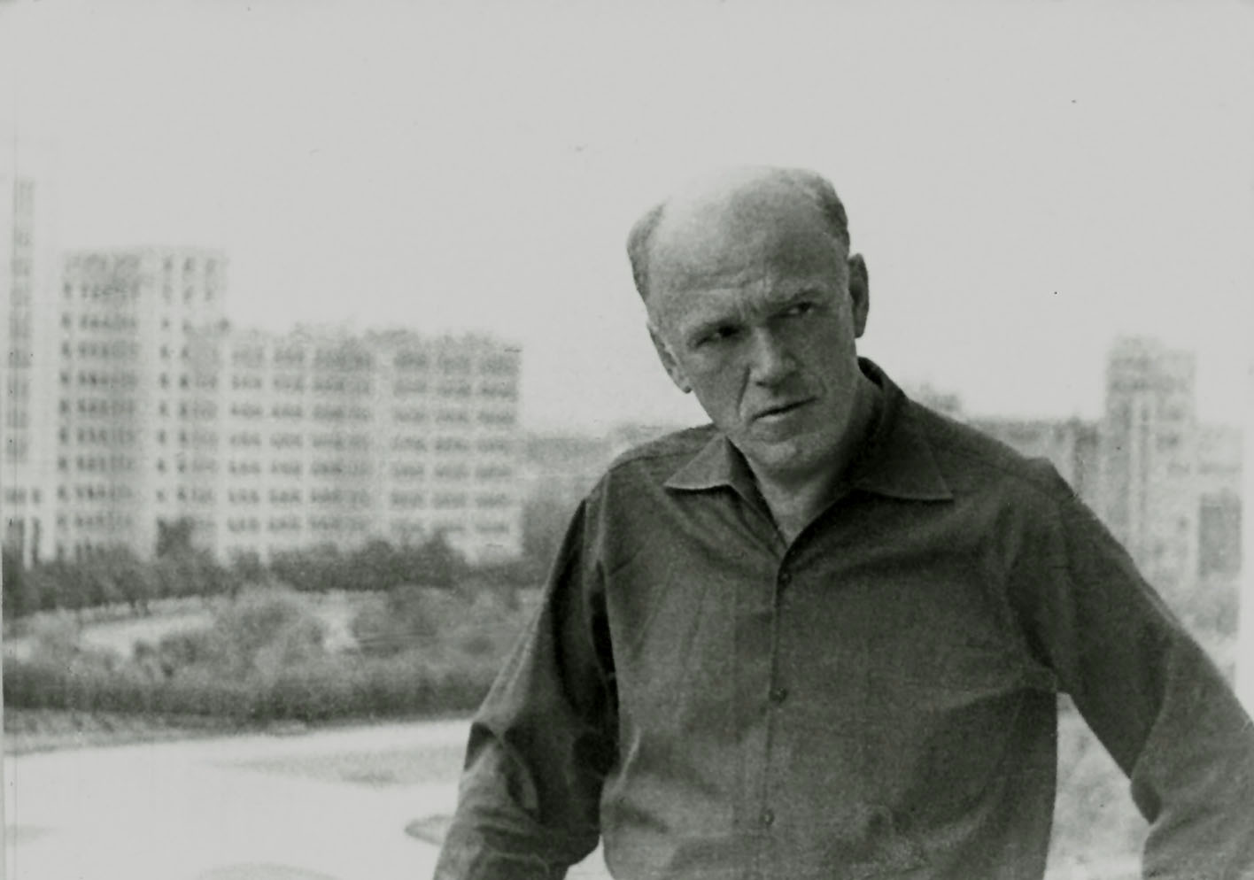 Пианист Святослав Теофилович Рихтер на балконе гостиницы "Харьков" перед сольным концертом в киноконцертном зале "Украина" в Харькове